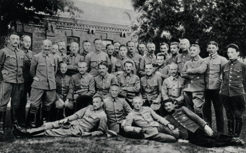 Grupa oficerów 1 pułku piechoty w obozie internowania w Benjaminowie. Na ziemi: ppor Stanisław Bogusławski ps. Kasper, ppor Tadeusz Jasieński-Werner, Kazimierz Moniuszko ps Borecki, chor. Stanisław Brodowski ps Skała. Siedzą: ppor Feliks Kwiatek, ppor Radoński, kpt Wacław Scaevola-Wieczorkiewicz, mjr Kazimierz Fabrycy, kpt Tadeusz Piskor, kpt Władysław Dragat ps. Orzechowski. Stoją: por Wacław Kostek-Biernacki, ppor Leon Grot, por Bronisław Dorobczyński ps. Czarny Janek, Jan Swarzeński-Rychlik, por Wacław Aleksandrowicz, ppor Aleksander Tomaszewski ps. Wysocki, ppor lek. Bolesław Mioduszewski, por Władysław Bortnowski, kpt Stefan Dąb-Biernacki, chor. Jołka, ppor Jan Prot, kpt lek. Stanisław Rouppert, por lek. Mikołaj Kwaśniewski, por Kazimierz Młodzianowski, chor. san. Jerzy Edmund Suffczyński, ppor Mara, por Janusz Dłużniakiewicz ps. Sęp, por Jan Kazimierz Kruszewski, ppor san. Antoni Paczesny.